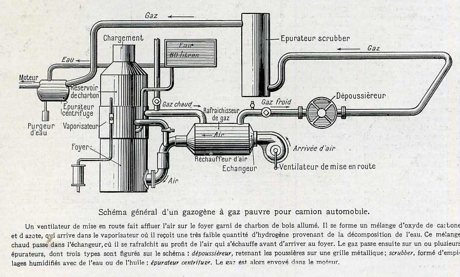 see picture